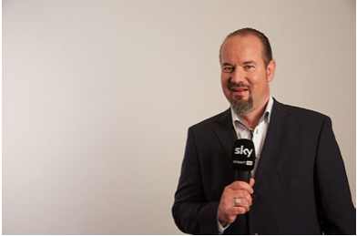 Portrait von Adrian Grosser, Golfmoderator bei Sky Deutschland